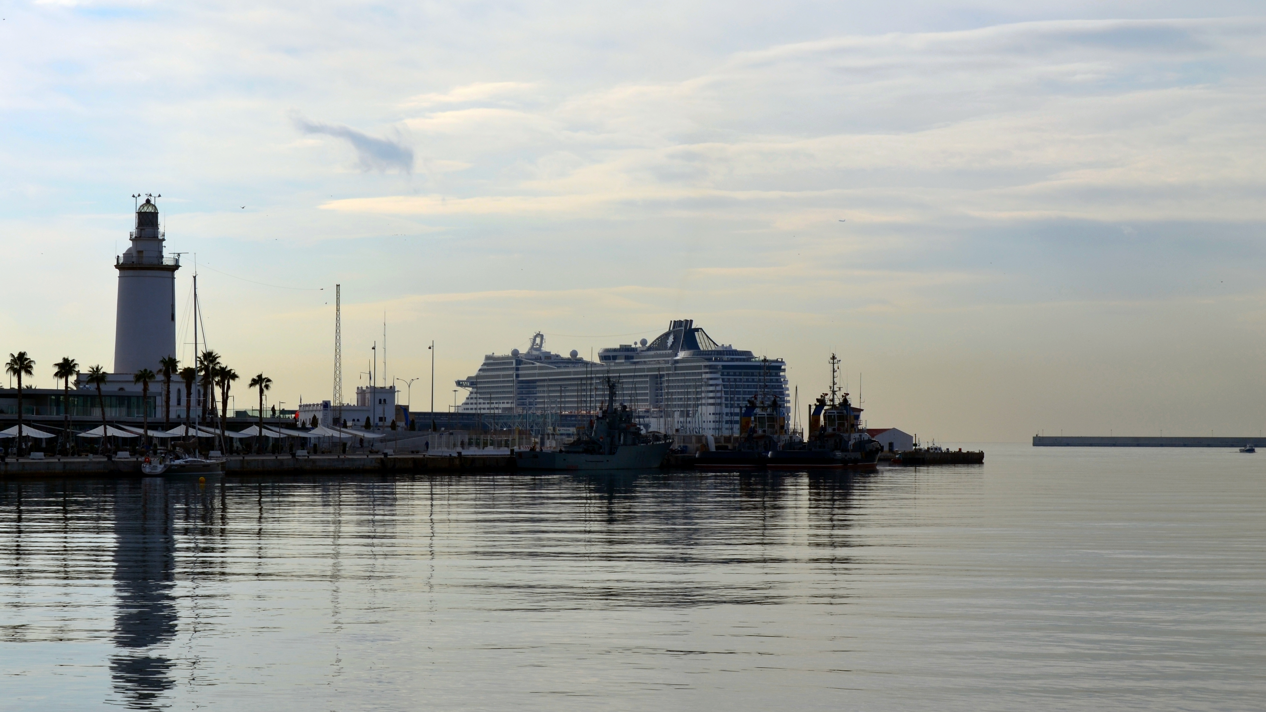 Puerto de Málaga, España.